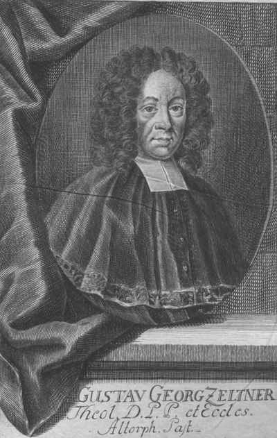 Zeltner, Gustav Georg (1672-1738) Theologe, Orientalist; Altdorf Kupferstich / Sysang, [Johann Christoph] ; o. J. Bild: 140x90 Enthalten in: Zeltner, Gustav Georg: Breviarum controversiarum cum enthusiastis et fanaticis. - 1724. - Frontispiz